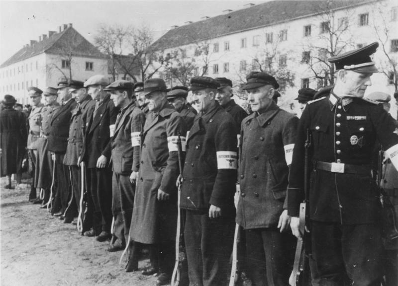 Das deutsche Volk steht auf Der Führer verkündete den Volkssturm. Deutsche Männer jeden Alters und aus allen Berufen sind zur Ausbildung angetreten und stehen zur Verteidigung ihrer Heimatgrenzen bereit. Foto: SS-PK-Falkowski/Transocean-Europapress (G) 21.10.1944 [Herausgabedatum] PK-H 6024